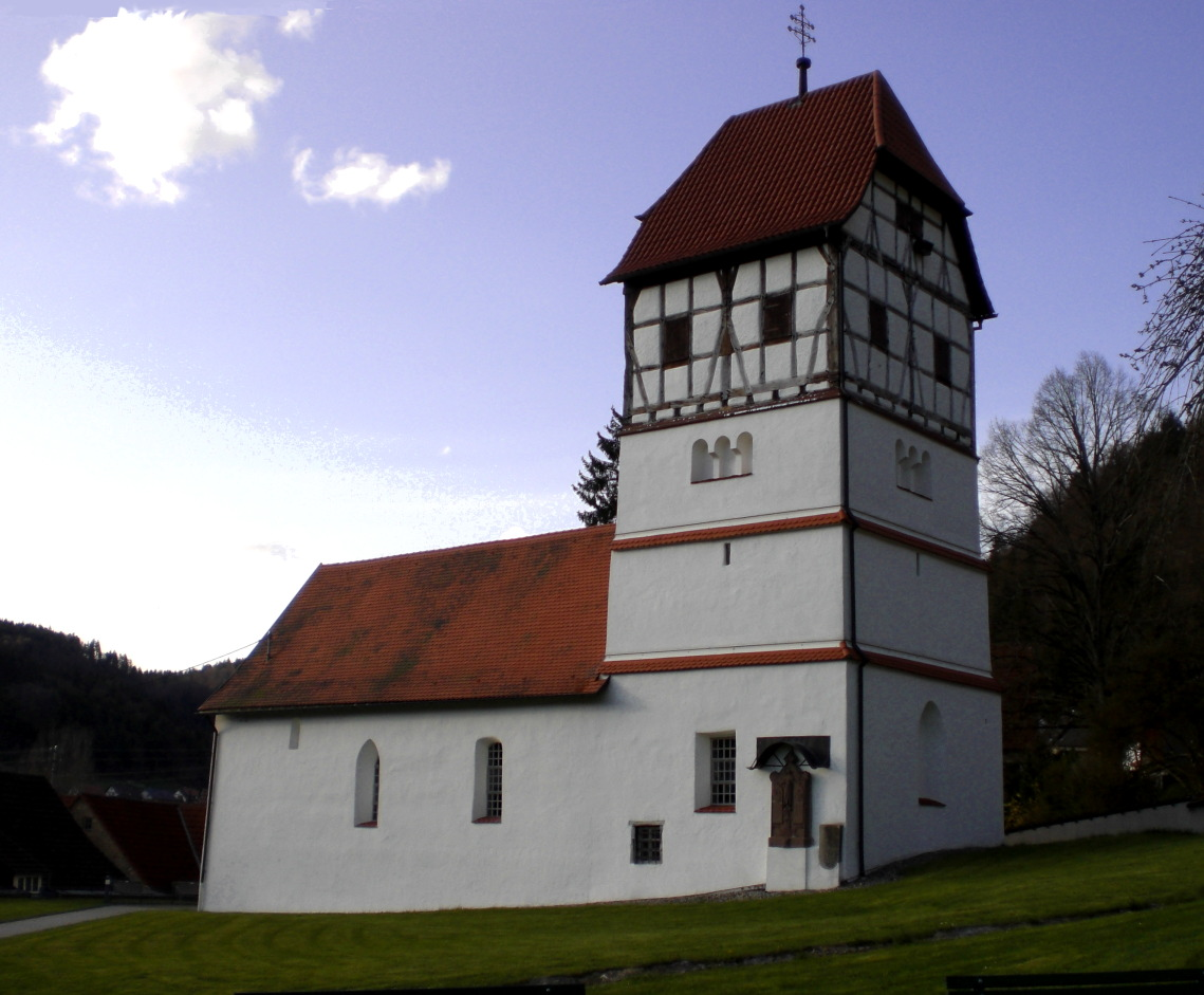 St. Peter und Paul: Restaurierte Friedhofskirche von 1250 in Nusplingen, Baden-Württemberg.